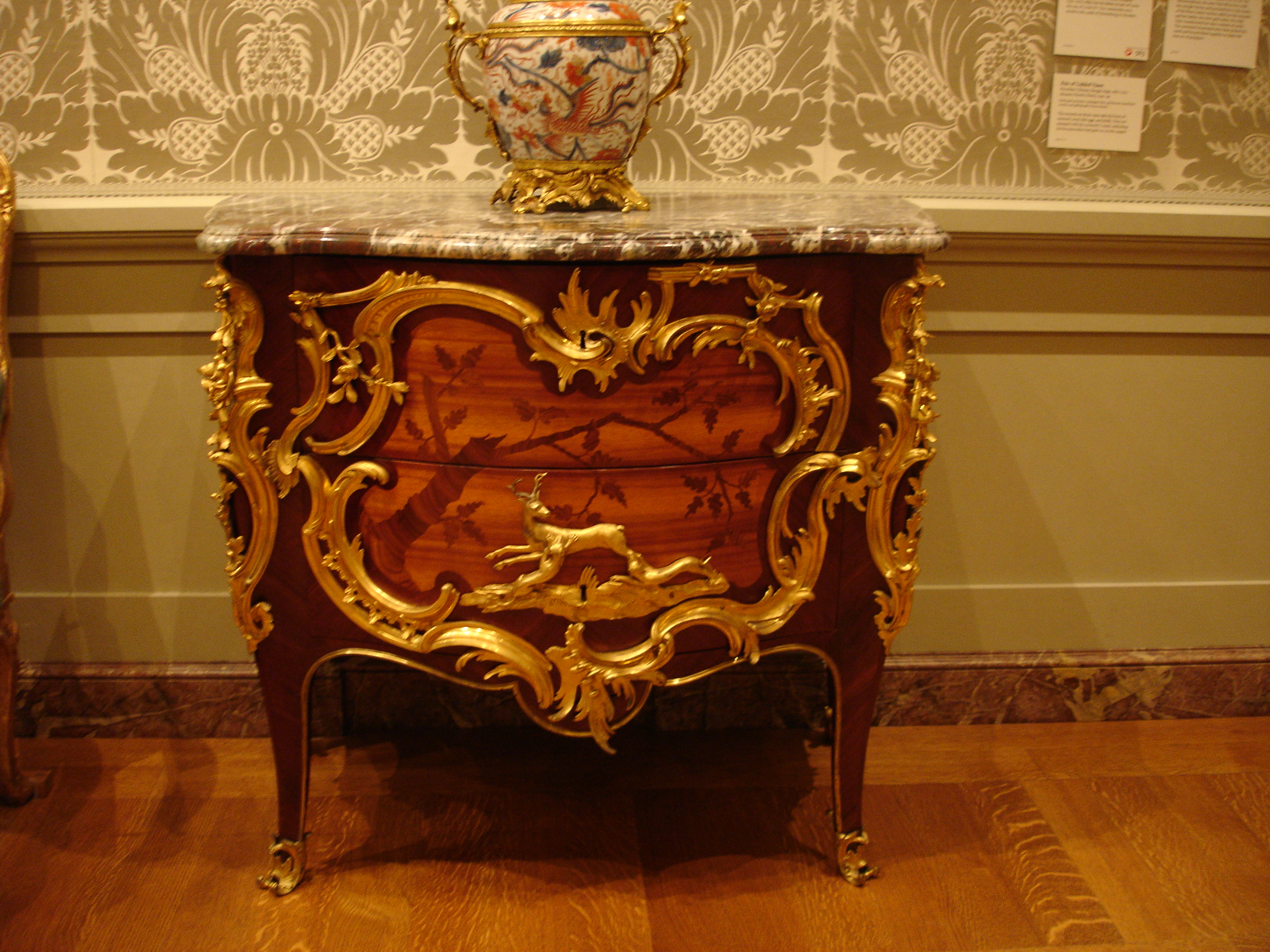 French